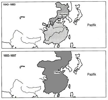 Kangxis conquests until 1697